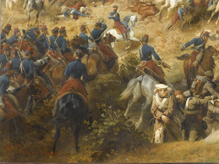 Chasseurs d'Afrique à la Bataille de Balaclava